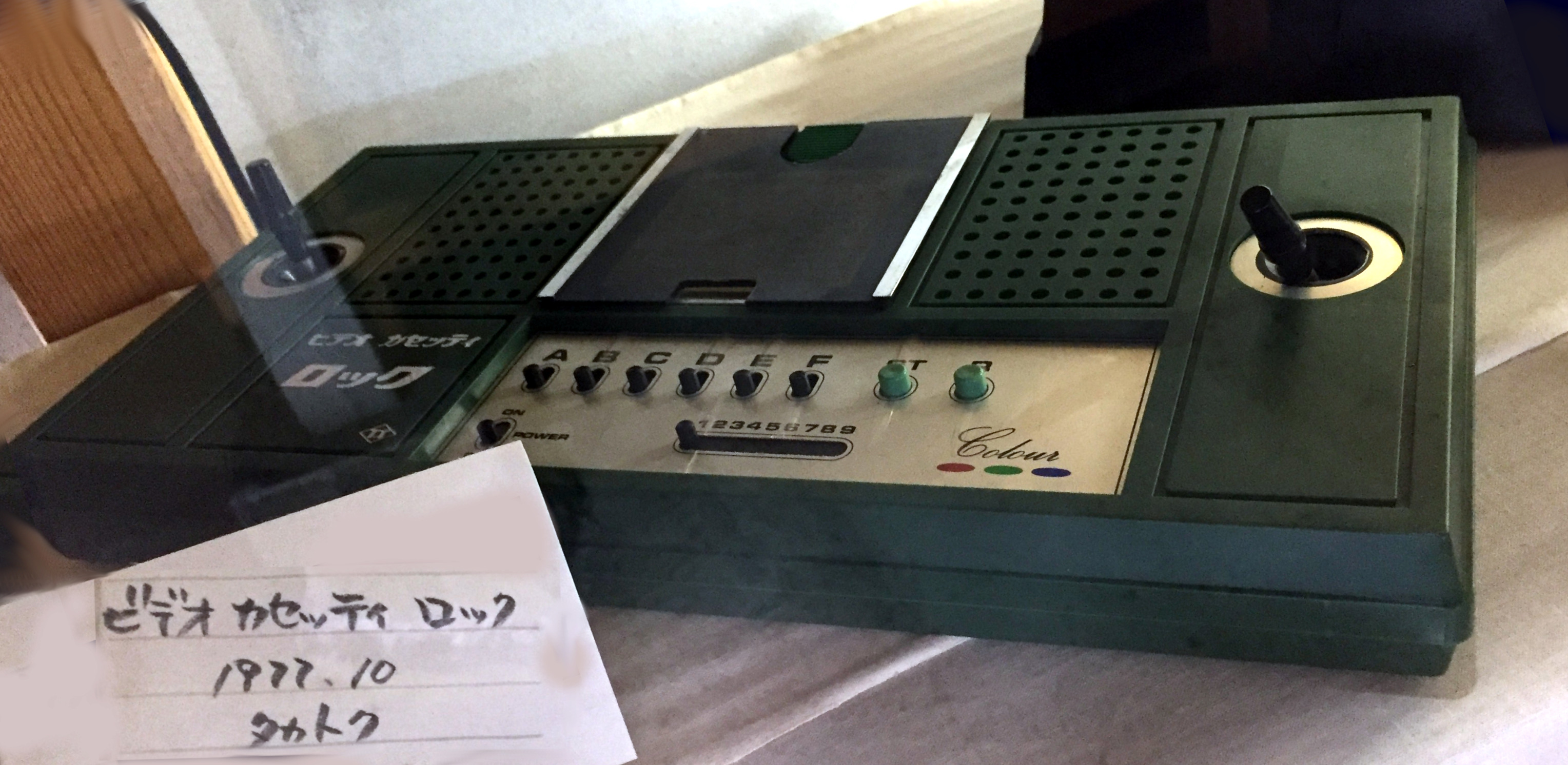 タカトクが1977年に発売したゲーム機『ビデオカセッティ・ロック』。JARGA（日本レトロゲーム協会）所蔵